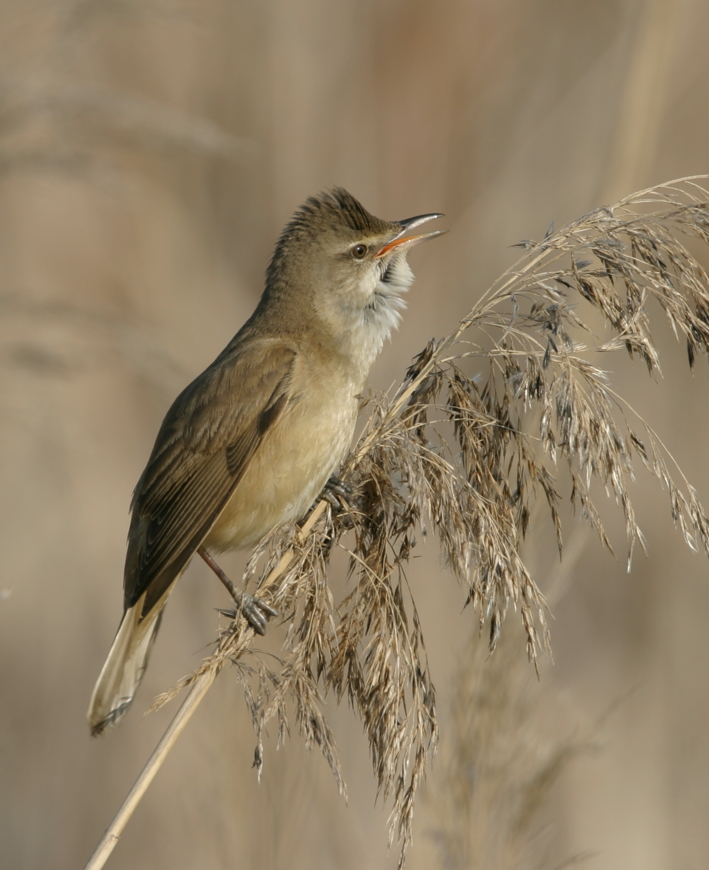 Great Reed Warbler (Acrocephalus arundinaceus, cat.) Carricero tordal sobre una flor de la caña, cantando en epoca de celo.